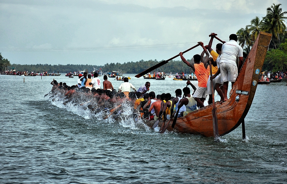 കോട്ടപ്പുറം വള്ളംകളി മത്സരത്തിനിടക്കു നിന്നുള്ള ദൃശ്യം